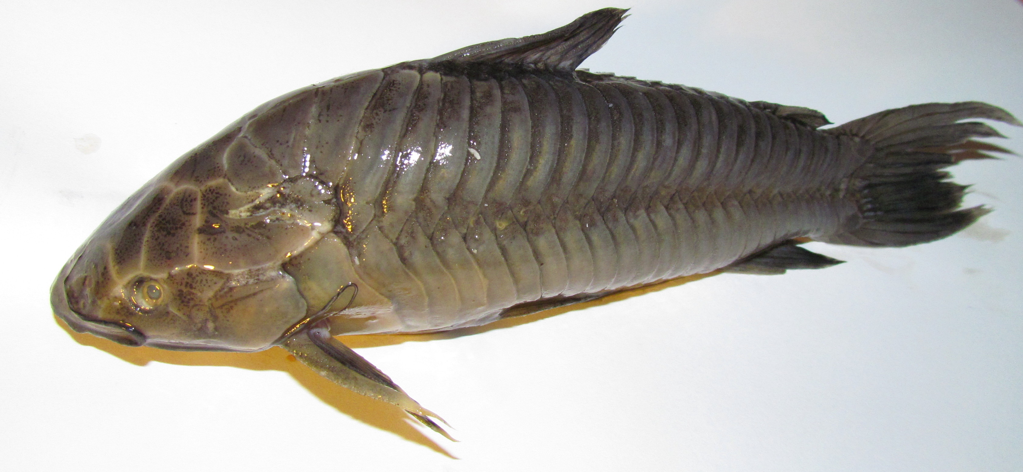 Atipa (Hoplosternum littorale) de Guyane Française